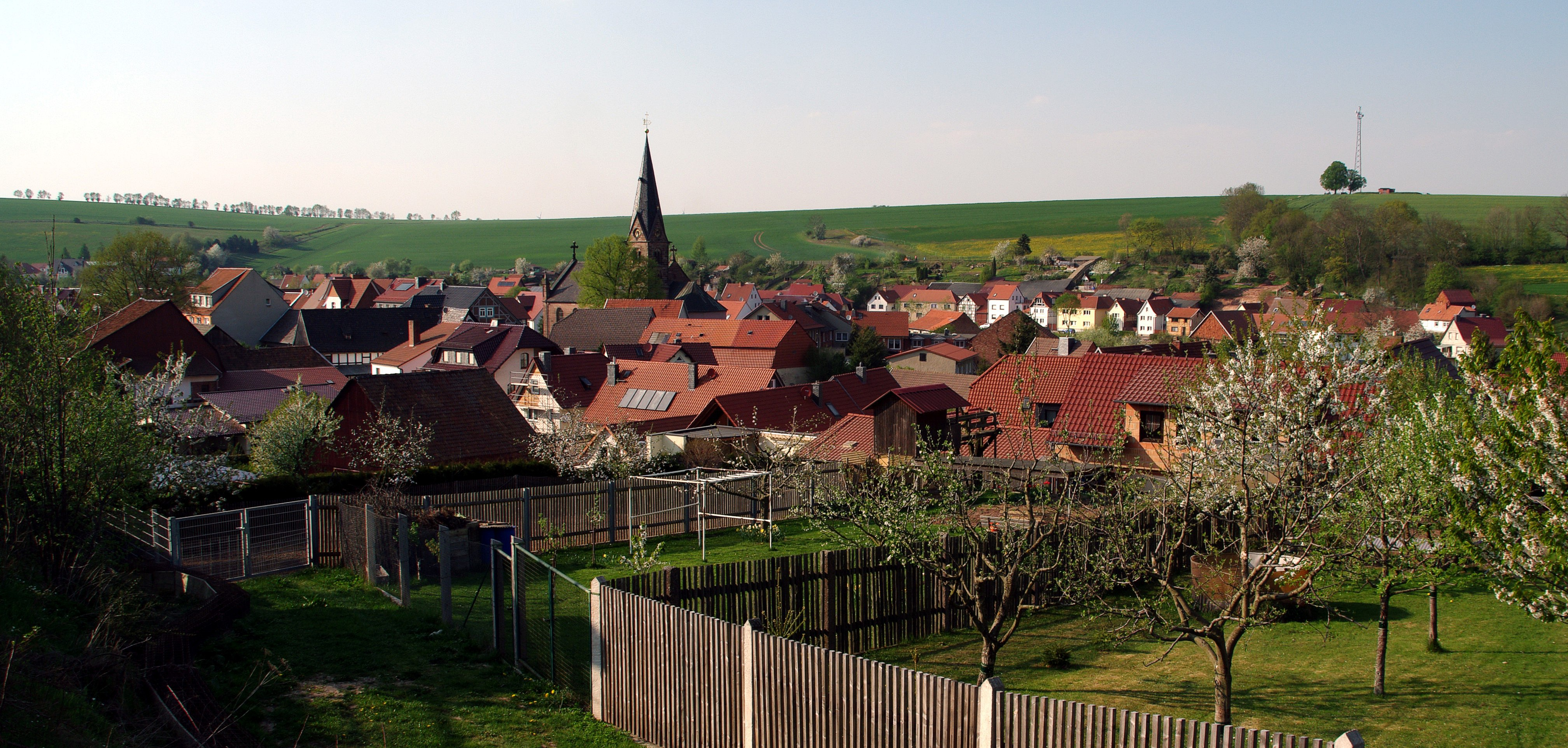 Wingerode im Eichsfeld vom Bahnhof aus gesehen.